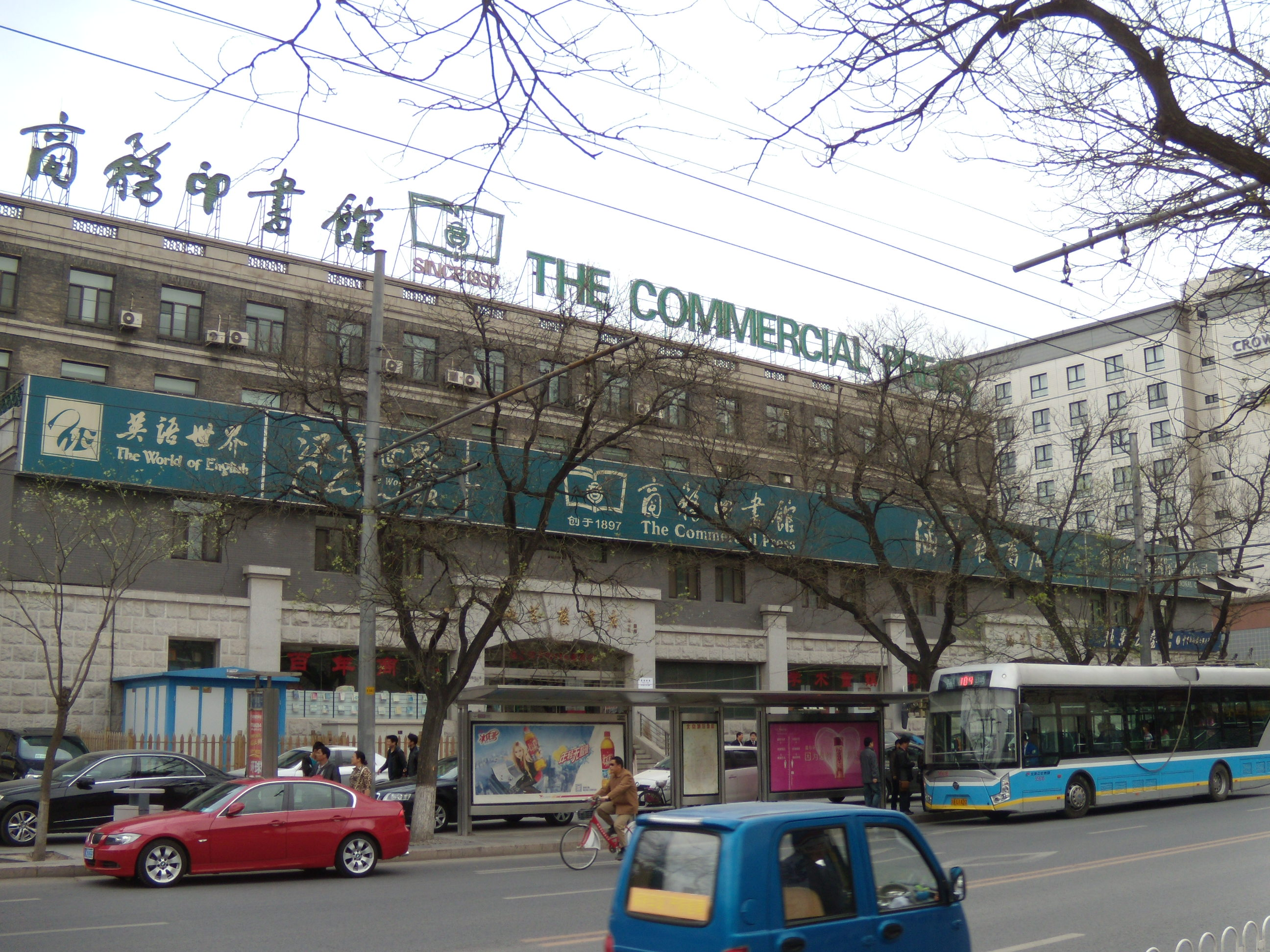 商务印书馆及涵芬楼书店，位于王府井大街